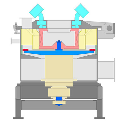 classifier mill